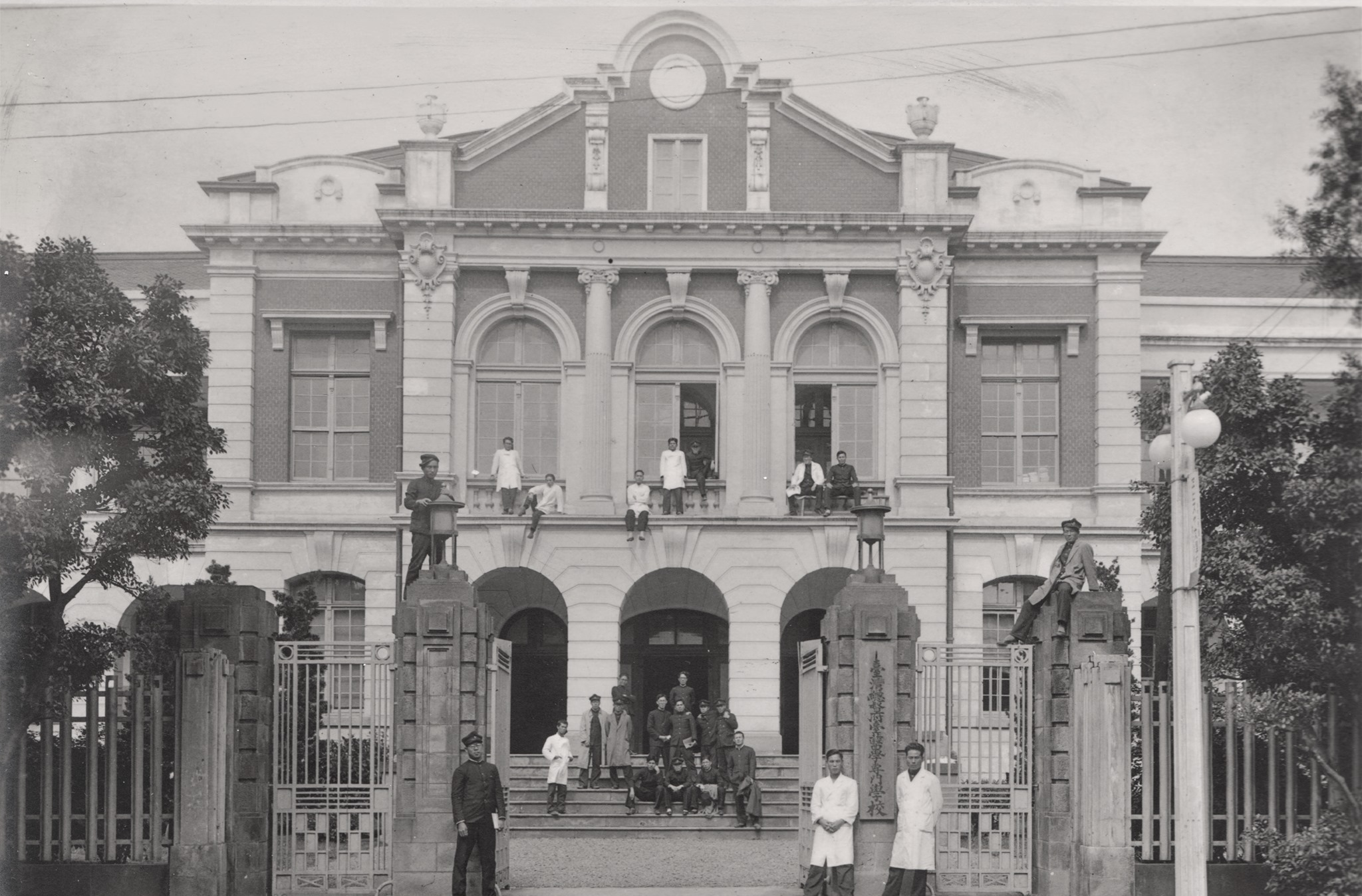 中文（台灣）: 臺灣總督府臺北醫學專門學校學生合影。